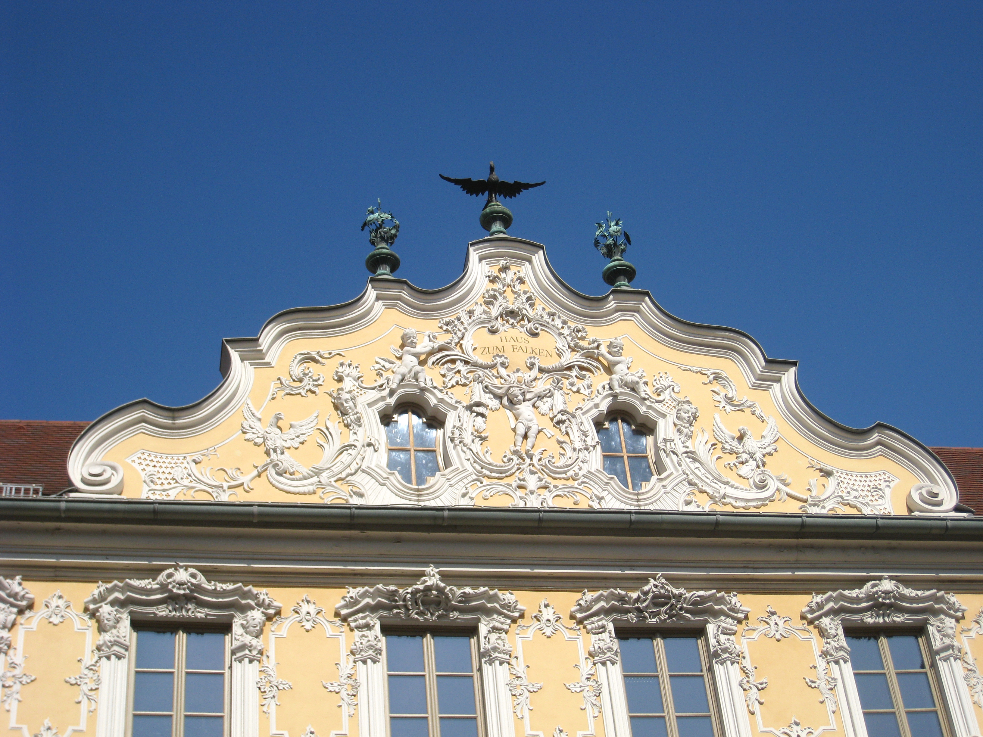 Front des Falkenhauses am Marktplatz in Würzburg, hier Detailaufnahme des Namens.